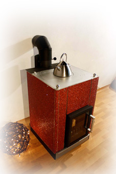 Kaminofen, wasserführend, 19 kW Heizleistung, Modell SolCourant mit Kochfeld zum Kochen